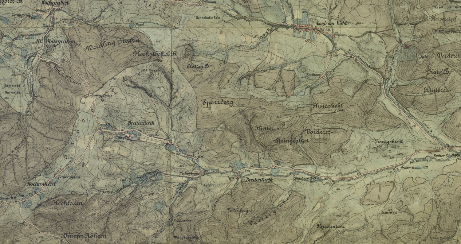 historische Landkarte: Gradkartenblatt Zone 13 Colonne XIV Section b3 (später 4756/2c). Pressbaum, Wolfsgraben, Breitenfurt, Hochrotherd, Laab im Walde im Wienerwald, Niederösterreich. Franzisco-josephinische (3.) Landesaufnahme der österreichisch-ungarischen Monarchie. Aufnahmeblatt 1:12.500. Aufgenommen 1872